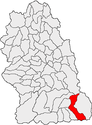 Categorie:Hărţi ale judeţului Hunedoara